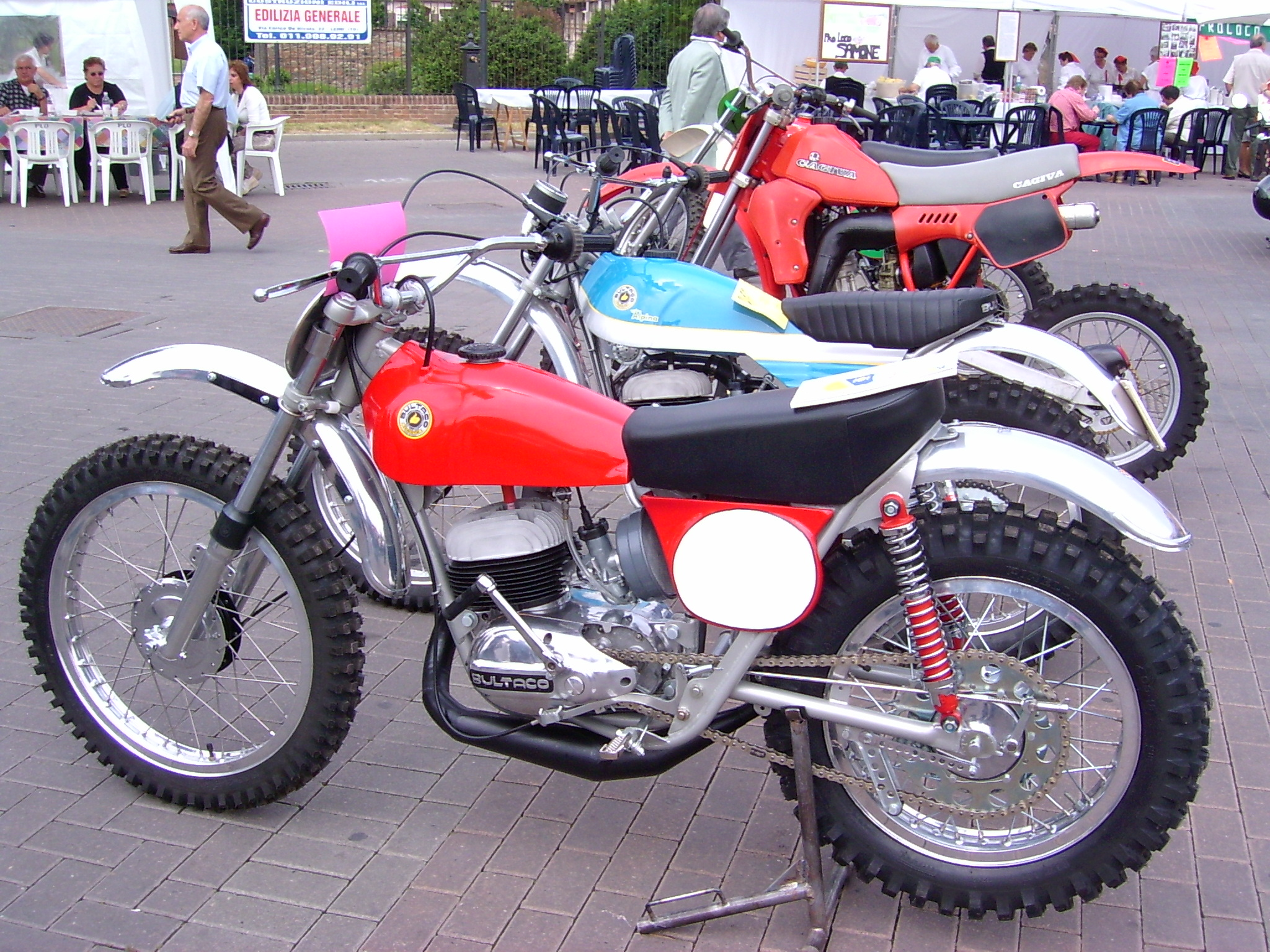 Foto scattata a Leinì per la festa del primo Maggio Leinì - Torino